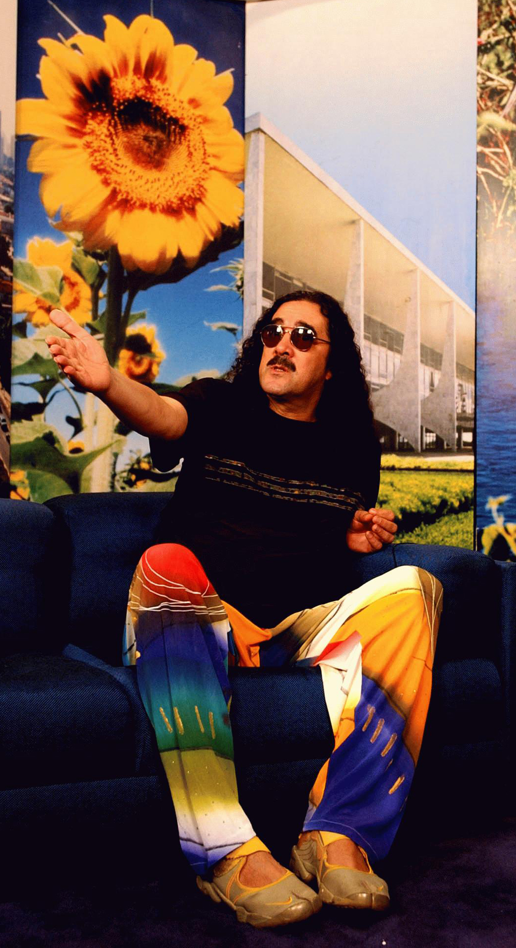 O músico brasileiro Morais Moreira.